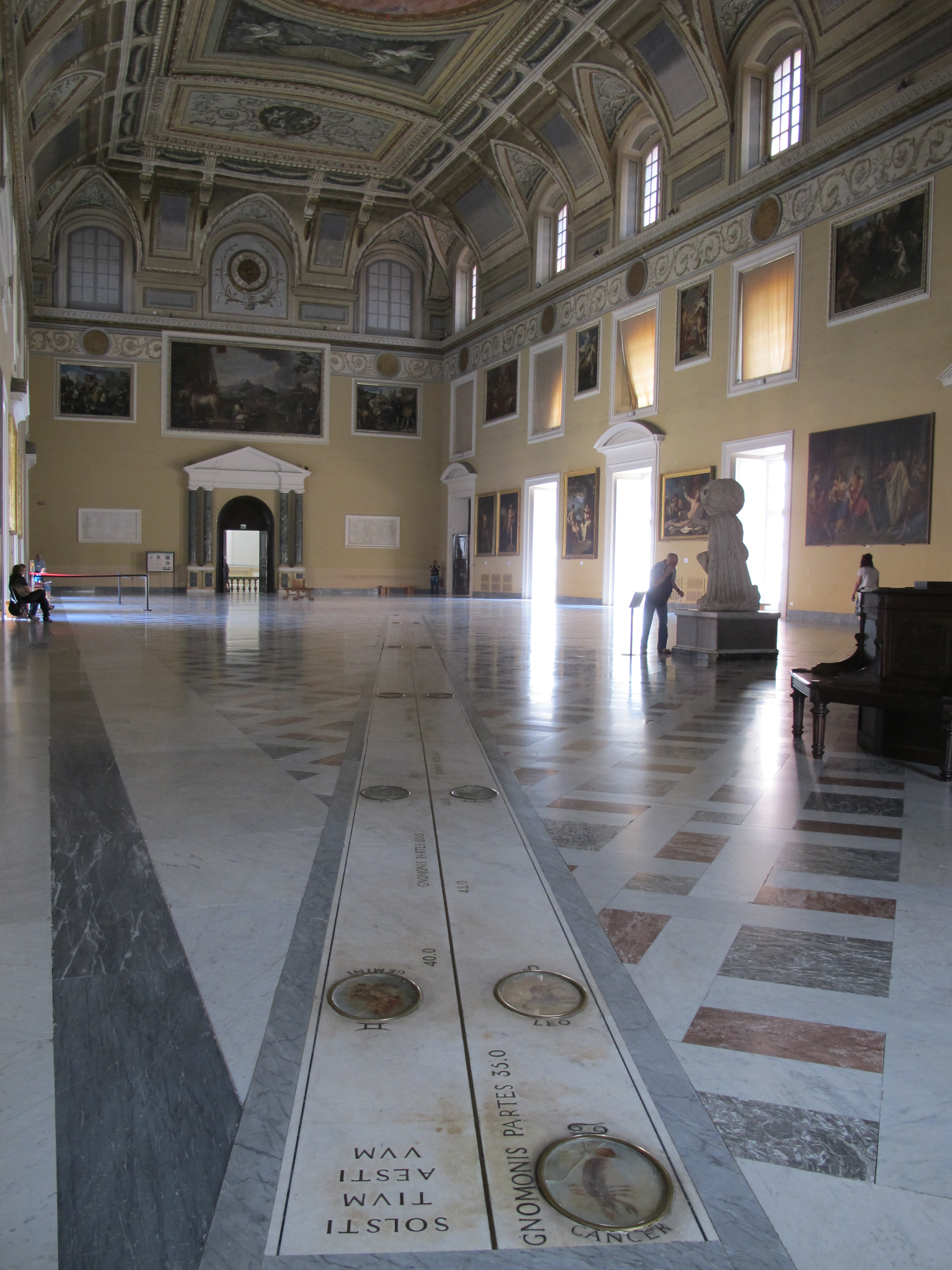 Museo archeologico nazionale di Napoli: il Salone della Meridiana, opera dell'architetto Giovanni Antonio Medrano. In primo piano, sul pavimento, la meridiana. Poco distante (di spalle) la statua dell'"Atlante Farnese".